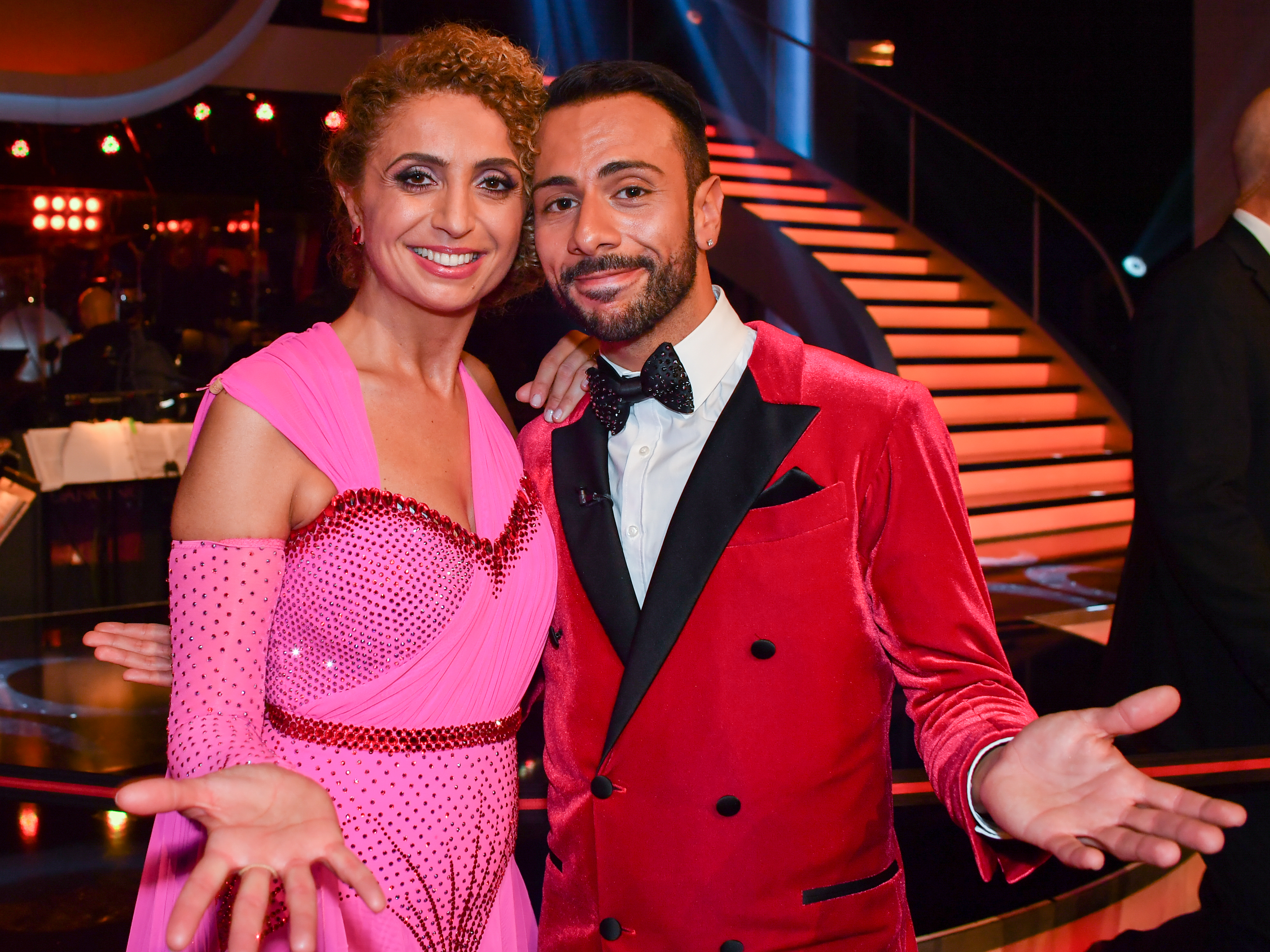 ORF Dancing Stars am 15. April 2017 in Wien. Bild zeigt Eser Ari-Akbaba und Danilo Campisi.